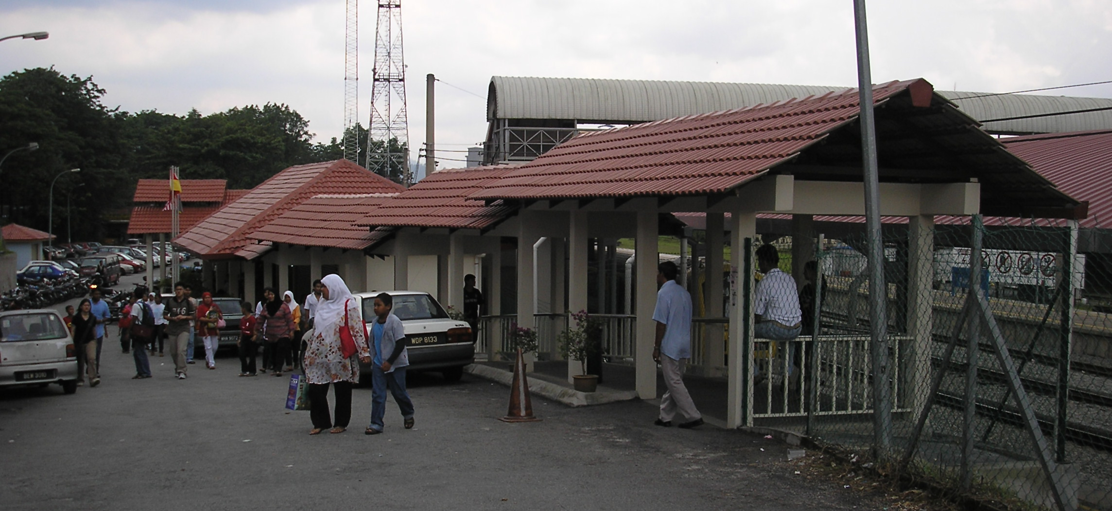 The Rawang railway station (Rawang-Seremban) (exterior), Rawang, Selangor, Malaysia.